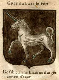 Gringalais le Fort